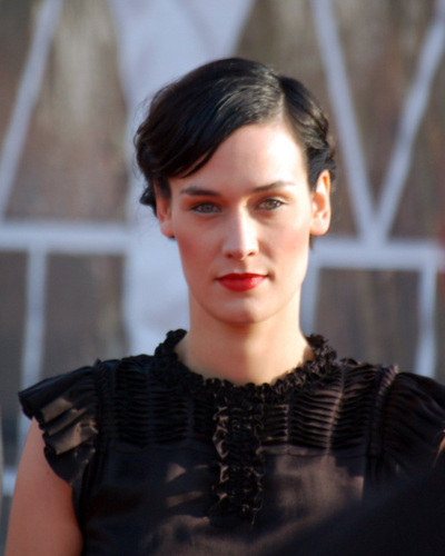 Clotilde Hesme au festival de Cannes